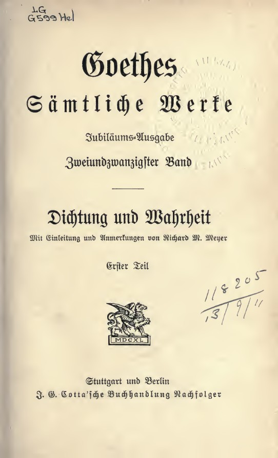 22: Dichtung und Wahrheit. Erster Teil / mit Einleitung und Anmerkungen von Richard M. Meyer. - Stuttgart und Berlin : J. G. Cotta'sche Buchhandlung Nachfolger, [1903-1904?]. - XXVI, 296 p.. - Data ricavata da: Gesamtverzeichnis des deutschsprachigen Schrifttums (GV) 1700-1910 . Frontespizio